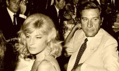 Gualtiero Jacopetti (con Monica Vitti) negli anni '60.